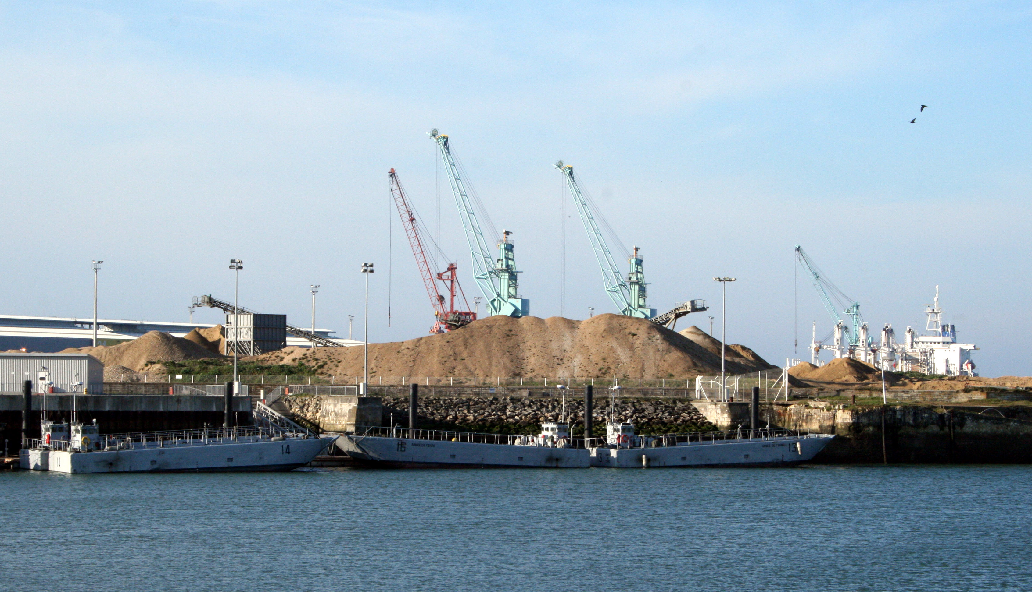 Bateau armée de terre à la Rochelle. Chaland de transport de matériel (CTM) du 519e régiment du train